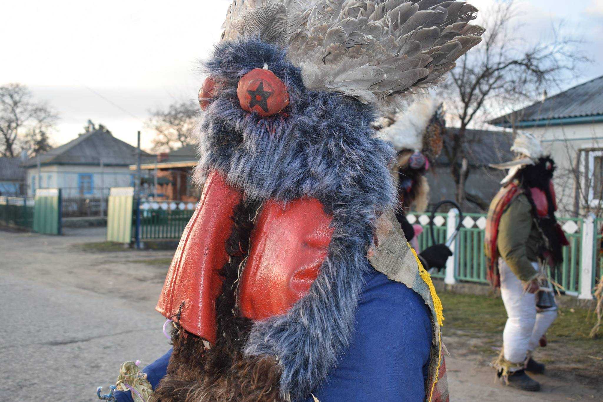 Традиційний Осичківський Дідок (село Осички, Савранський район, Одеська область, Україна) 2017 рік